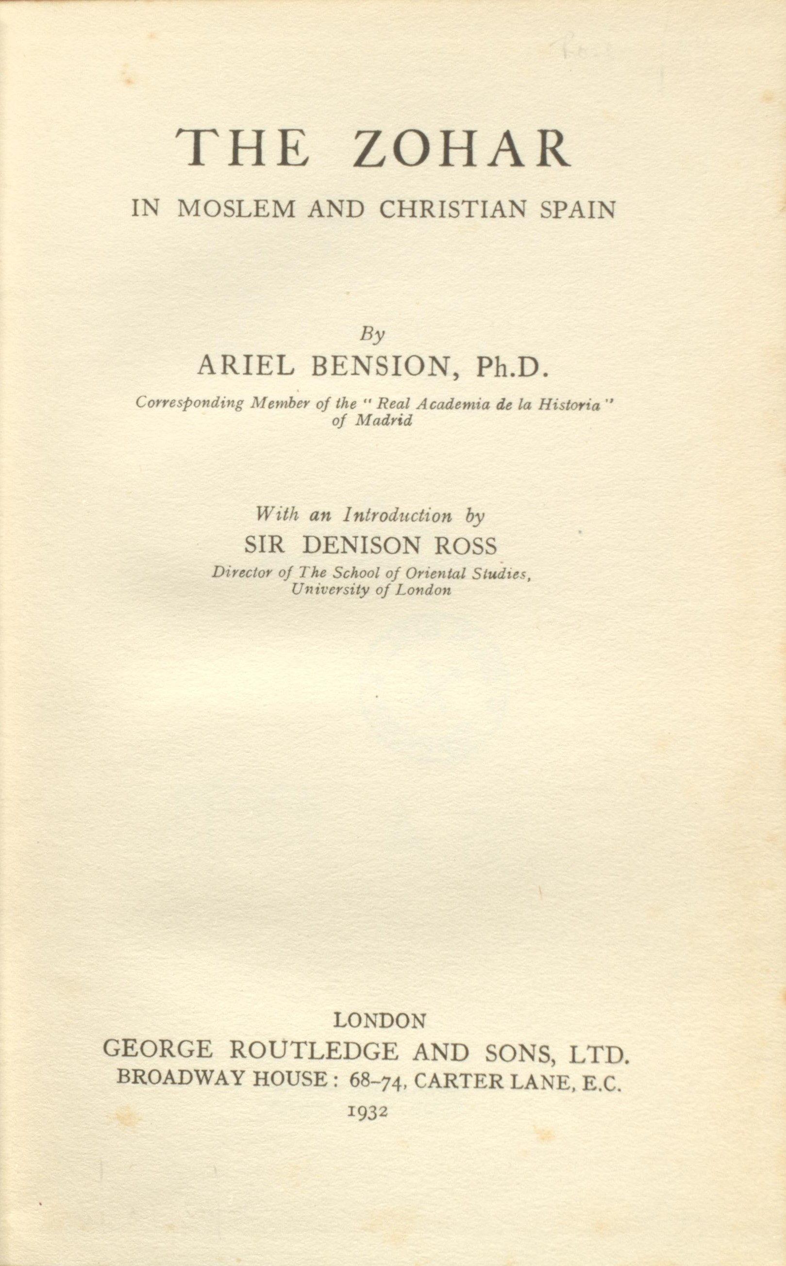 Ariel Bension The Zohar in Moslem and Christian Spain 1932